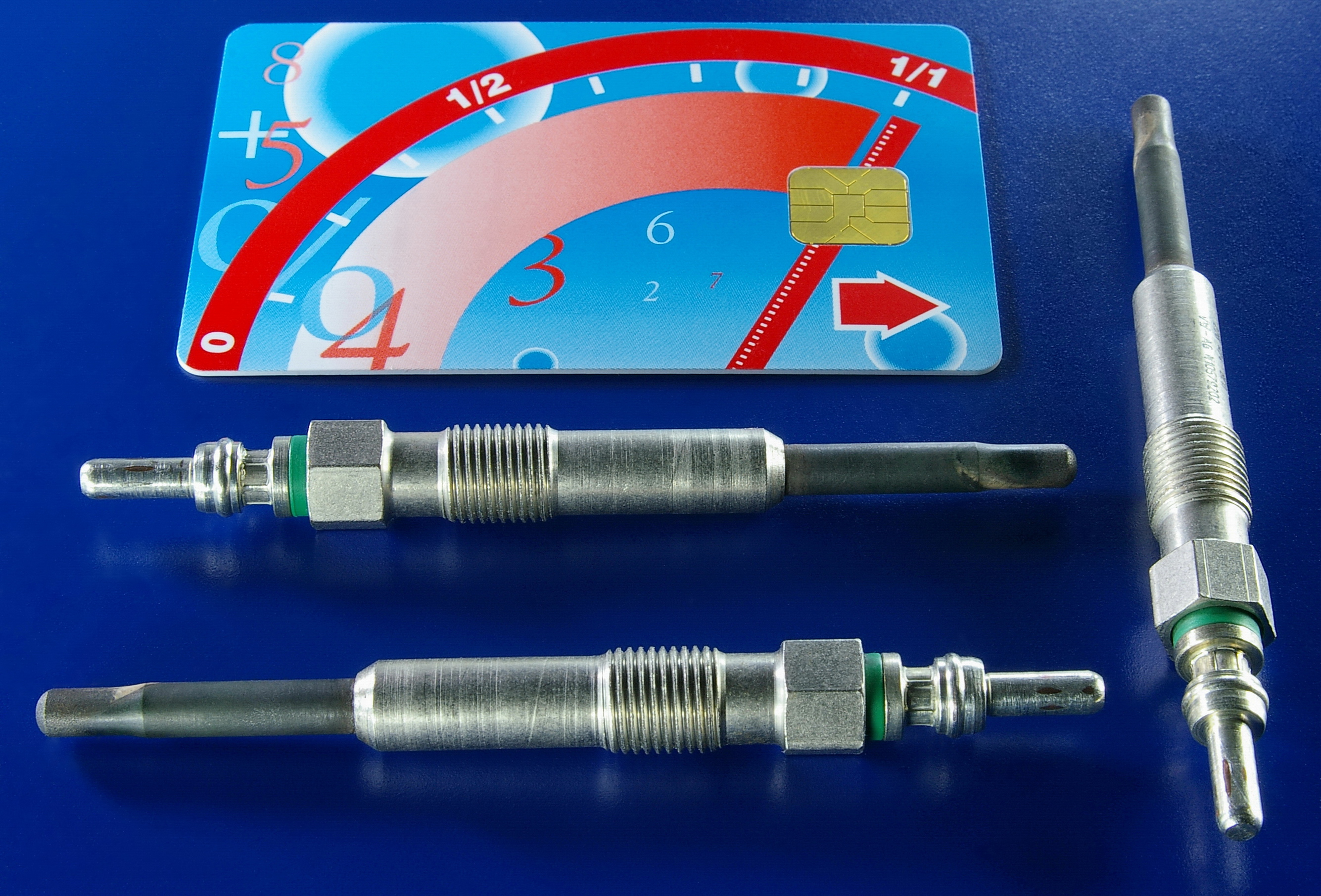 Glühkerzen aus PKW-Dieselmotor 1,9l nach 130.000 km Laufleistung (funktionsfähig), ISO-7810-Karte als Größenvergleich.